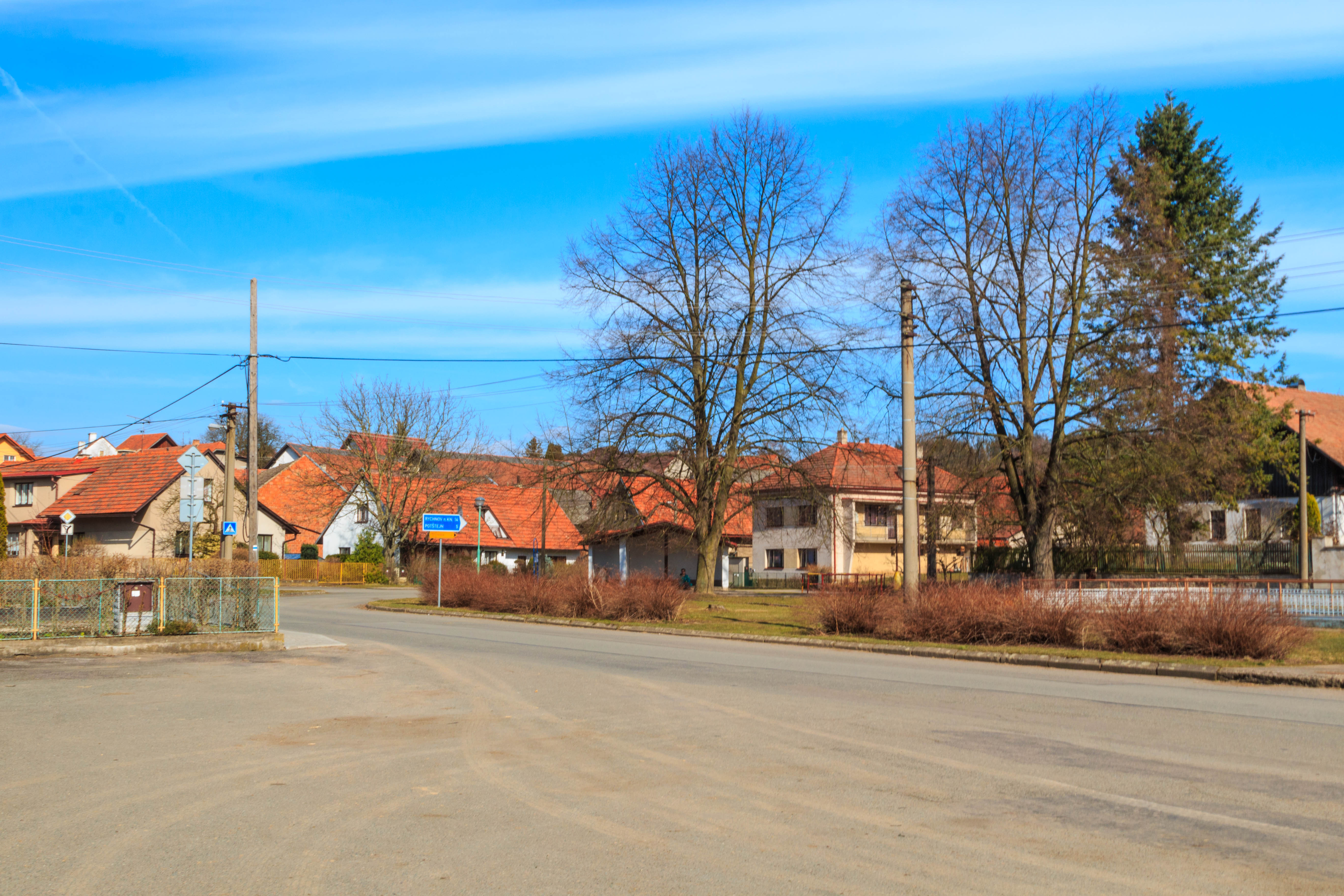 Malá Lhota - náves